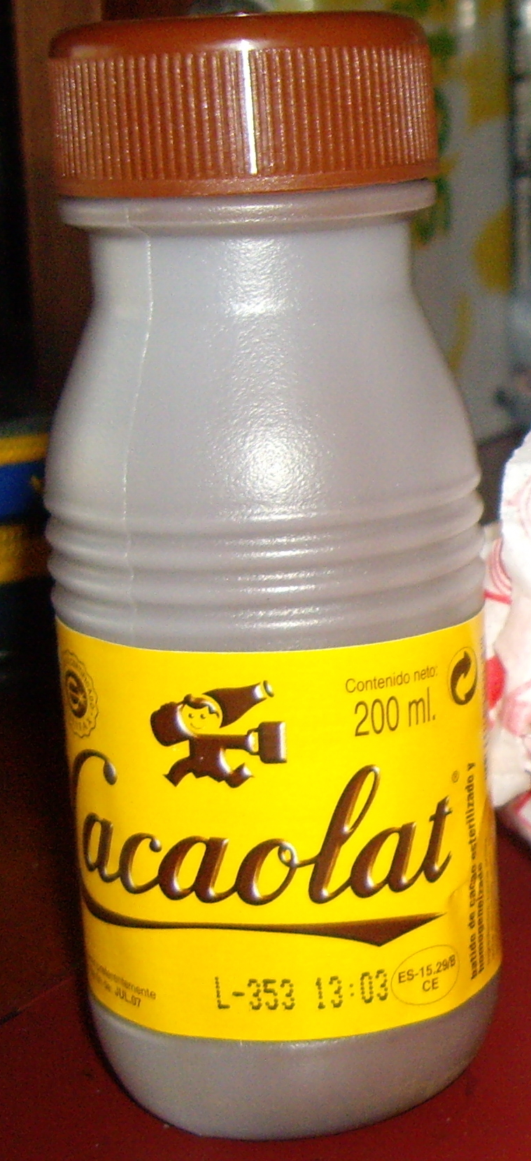 Un paquete de donuts y un botellín de Cacaolat. Descripción original en Flickr: "merienda mmm".